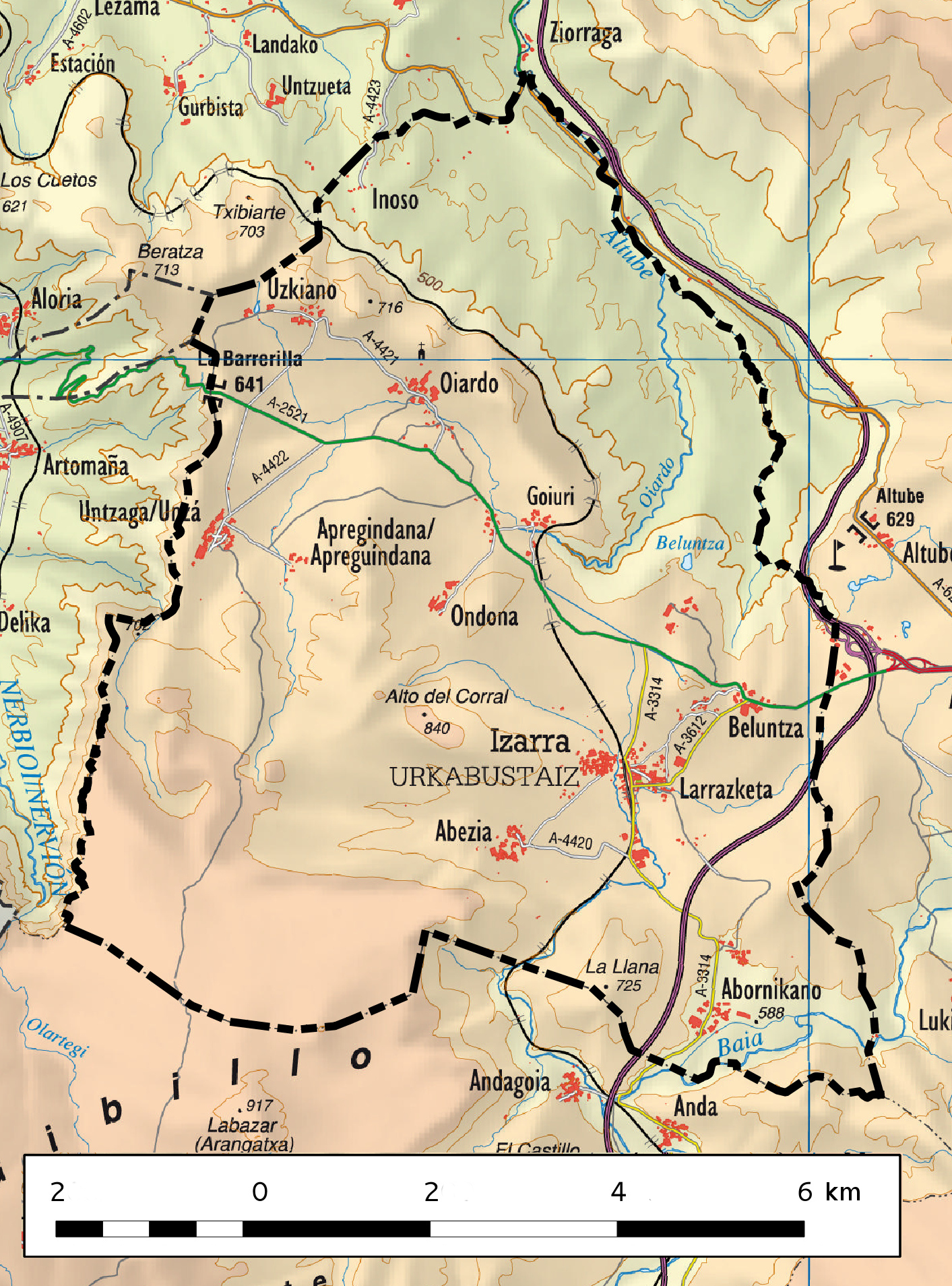 Urkabustaiz udalerriaren mapa